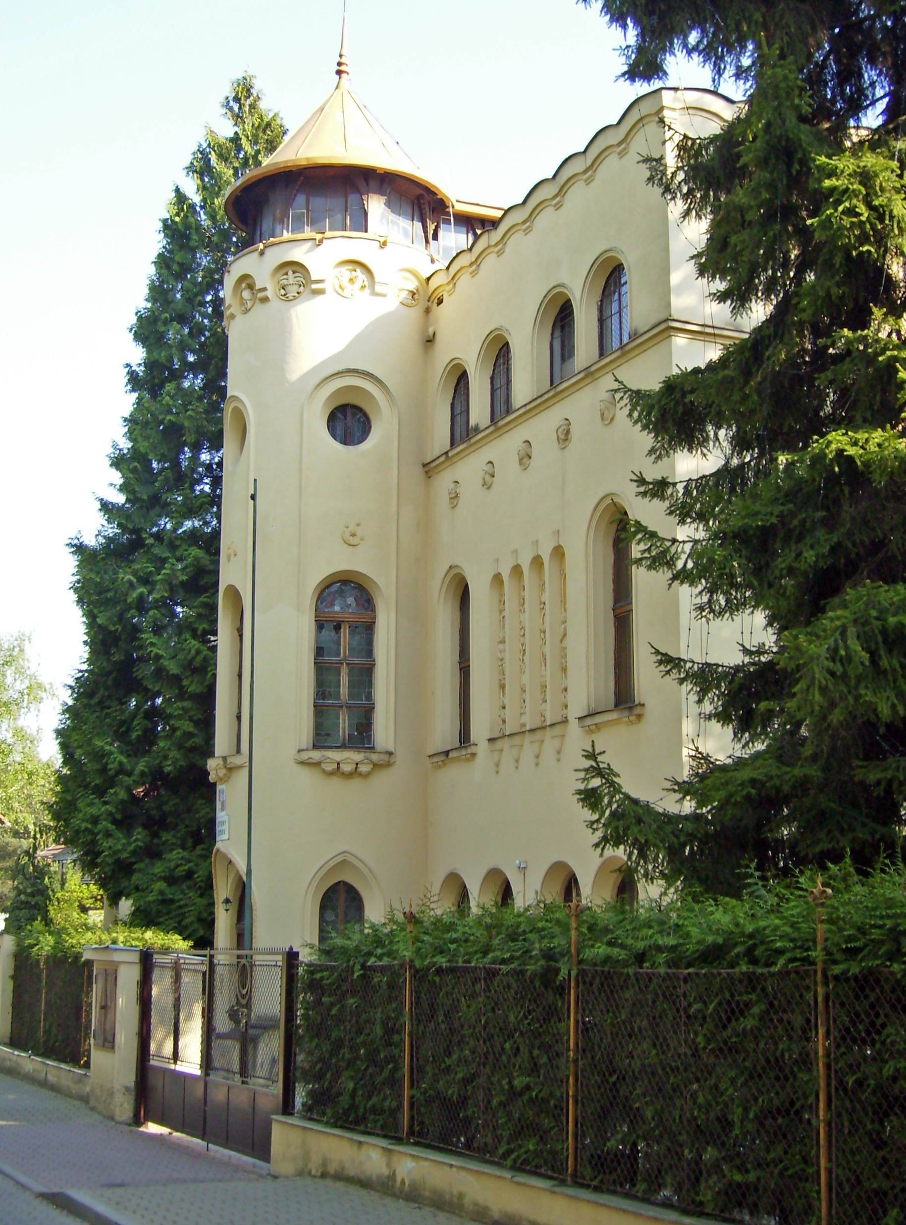 Dětský domov v Klánovicích, hlavní budova, Smržovská 77.